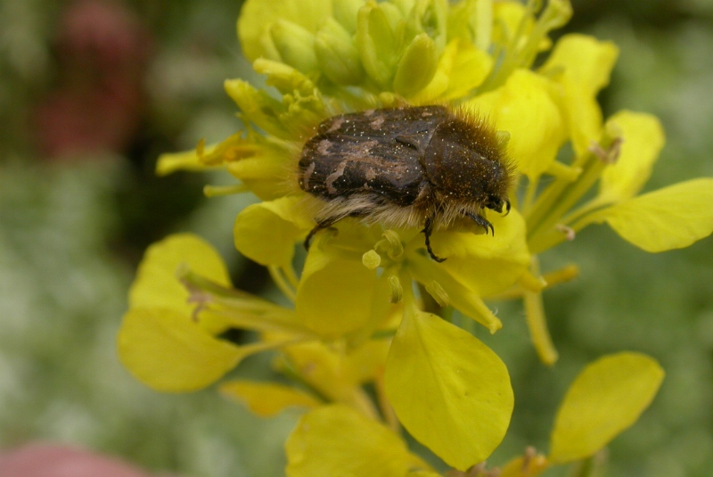 Epicometis hirta, Gradignan, Gironde, France